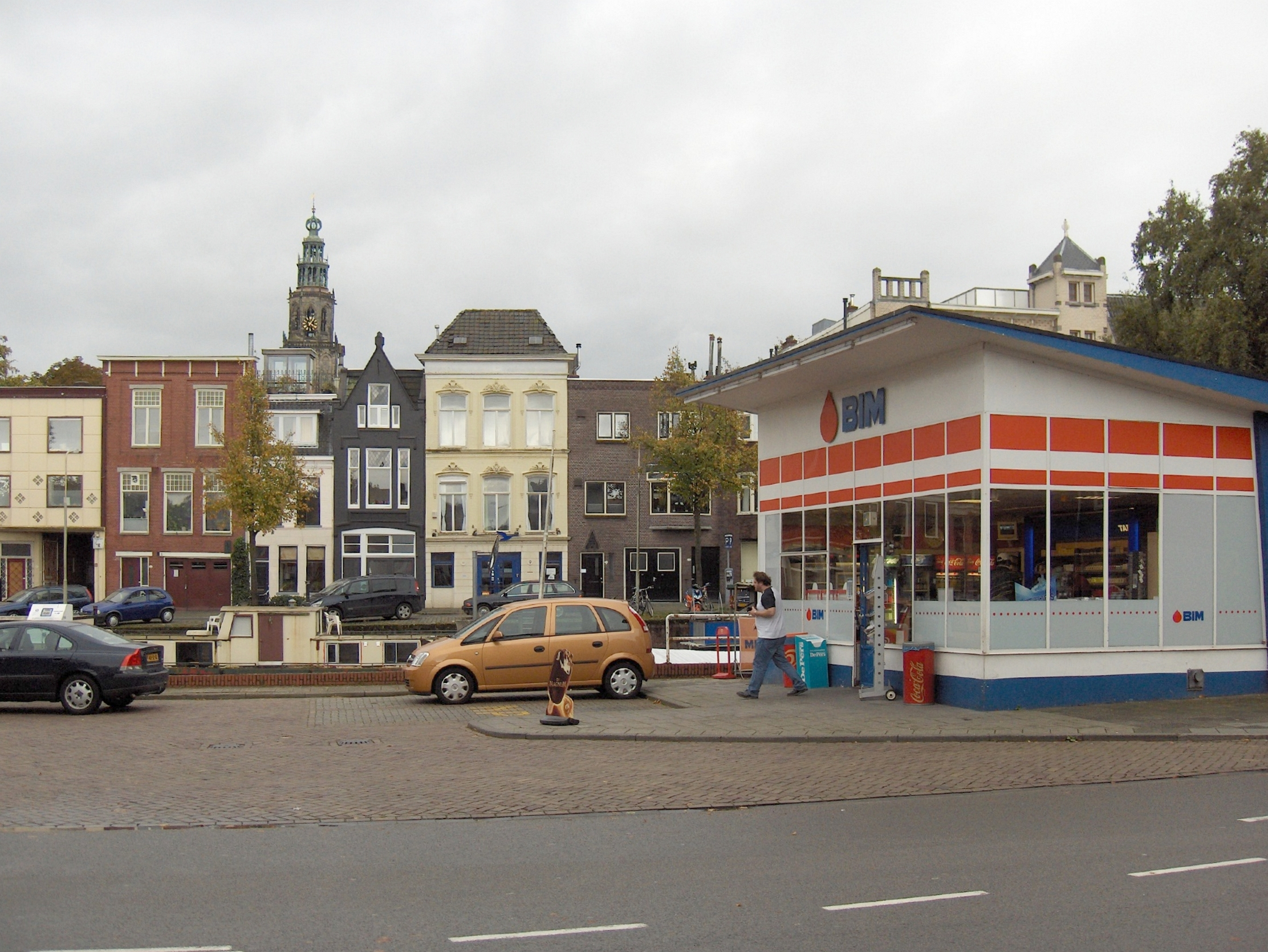 Benzinestation (1954-'55, W.M. Dudok, rm 530857) aan de Turfsingel in Groningen